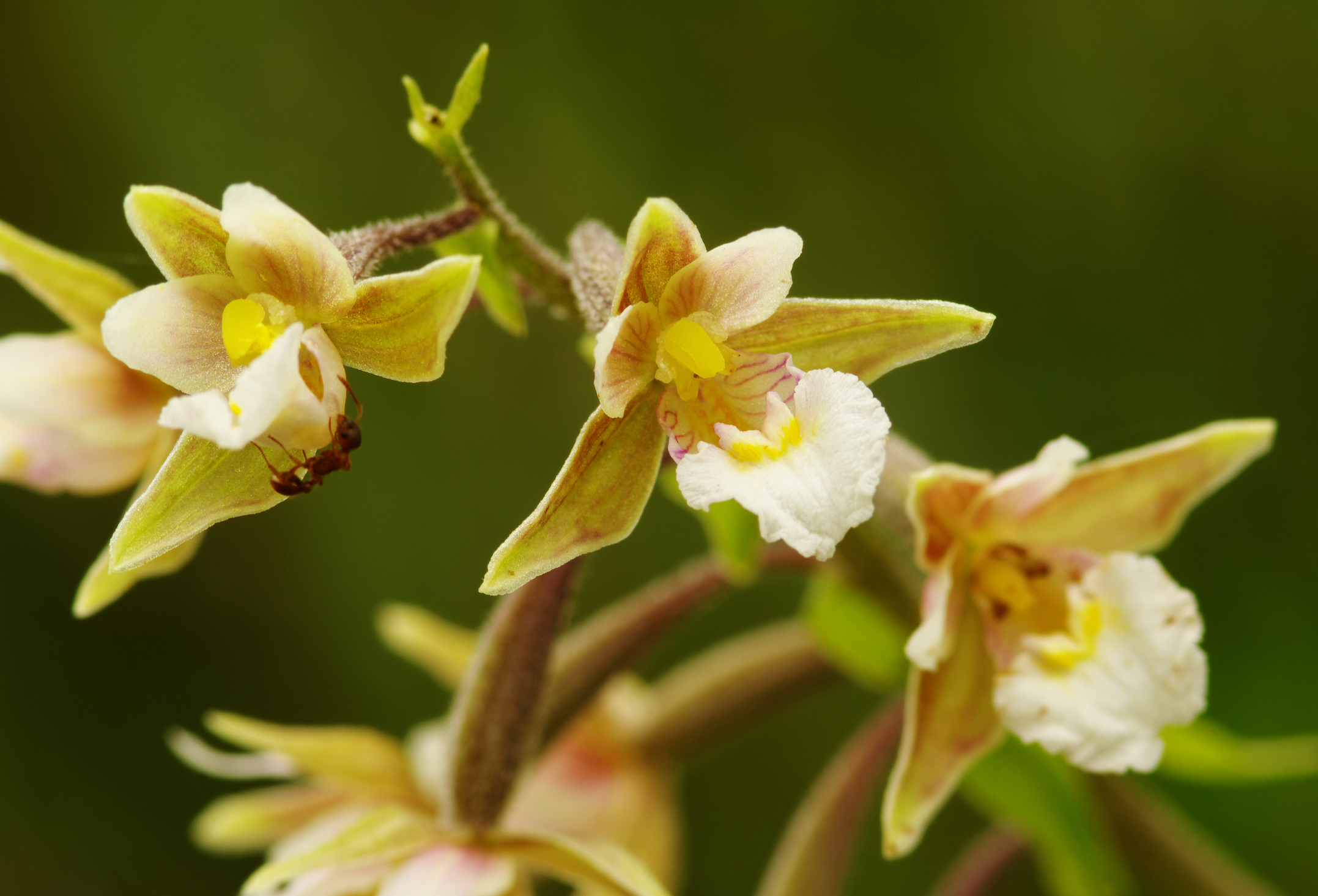 Kruszczyk błotny (Epipactis palustris) / Kuźnica Warężyńska - Dąbrowa Górnicza